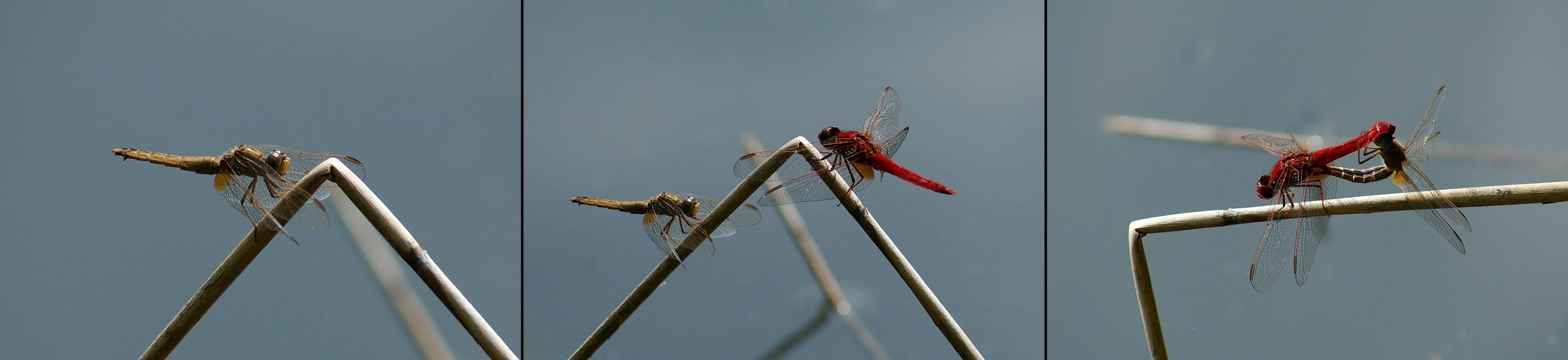 Die Feuerlibelle, hier beim Flirten, (Crocothemis erythraea) ist eine Libellenart aus der Familie der Segellibellen (Libellulidae), die zu den Großlibellen (Anisoptera) gehören. Gesehen im alten Rhein bei Hohenems.